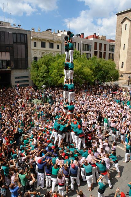 Primer 2 de 8 amb folre carregat pels Castellers de Sabadell per la Festa Major de Sabadell (Plaça de Sant Roc, Sabadell, 4 de setembre del 2011).